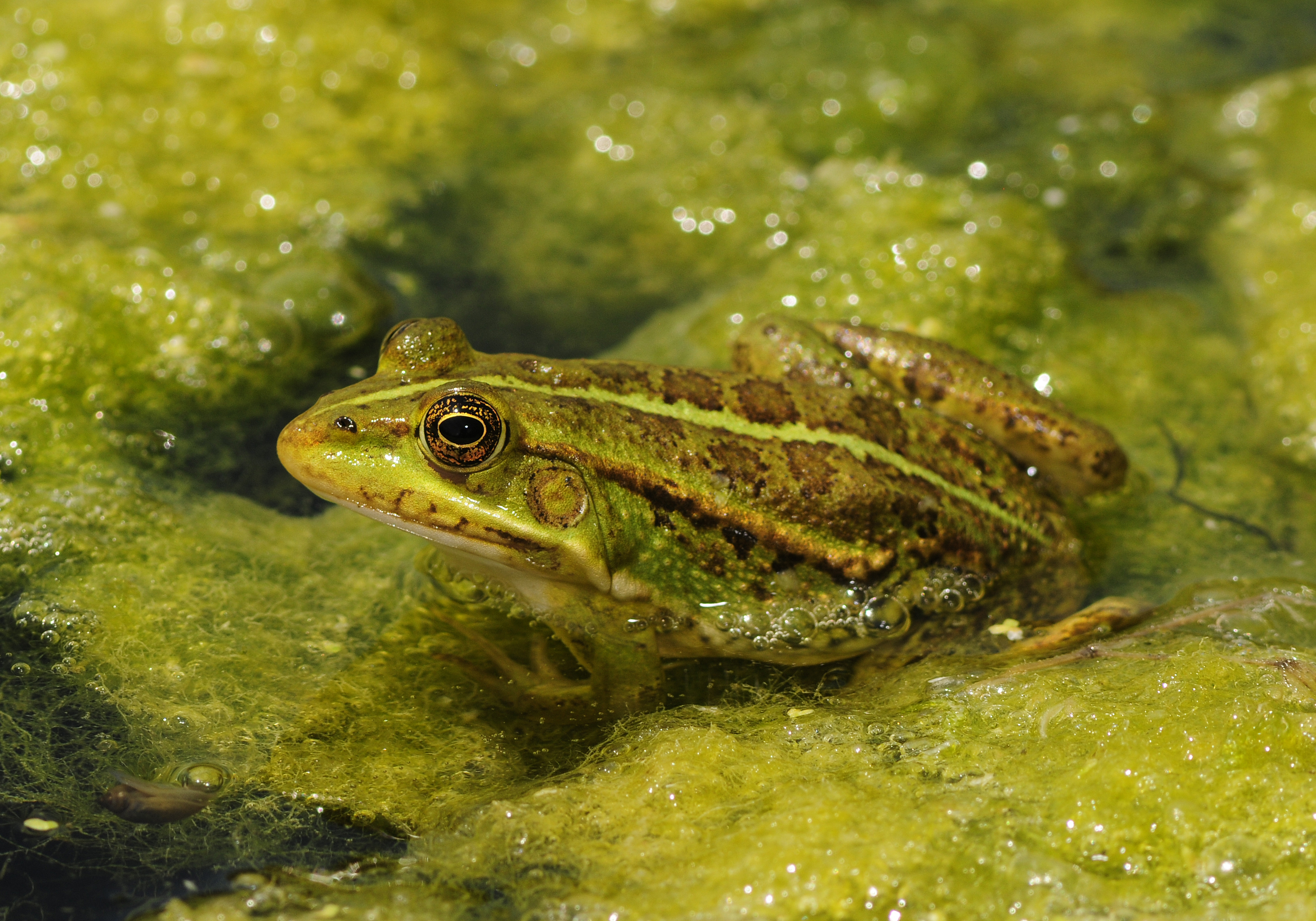 Balkan-Wasserfrosch (Pelophylax kurtmuelleri) vom Peloponnes in Griechenland